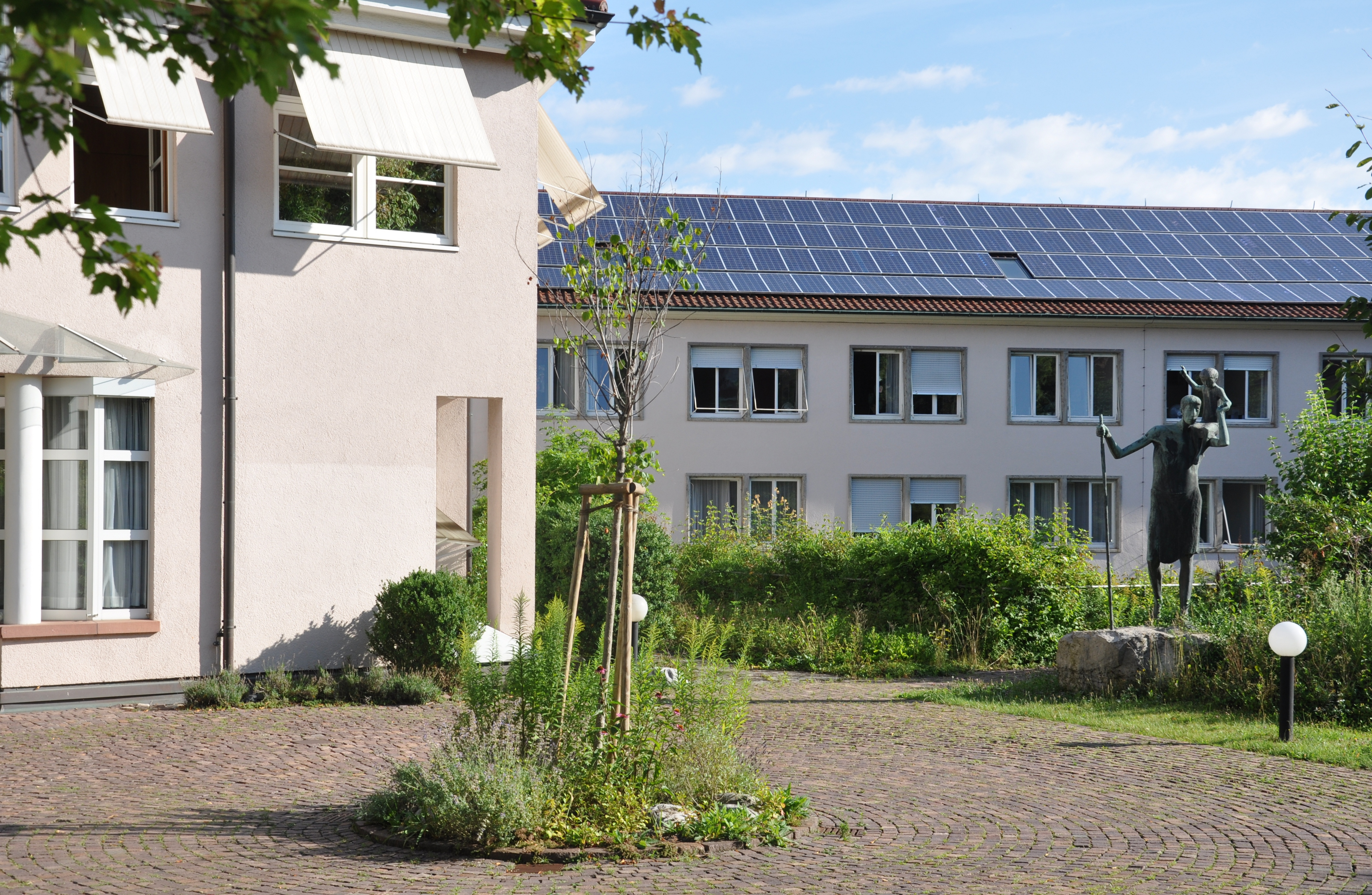 Stuttgart, Dienstgebäude des Oberkirchenrats der Evangelischen Landeskirche in Württemberg, Gänsheidestraße